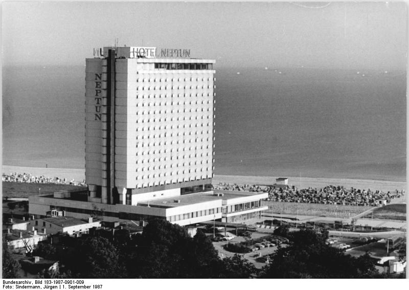 Warnemünde, Hotel "Neptun" ADN-ZB Sindermann 1.9.87 Bez. Rostock: Urlaubszentrum - Rund 500 FDGB-Urlauber können pro Durchgang im Kongreß-, Ferien-, und Reisehotel "Neptun" unmittelar am Strand von Warnemünde angenehme Ferientage verleben. Das 1971 eröffnete Haverfügt über 715 Betteee, hat 1400 gastronomische und 450 Konferenzplätze. Bars, Diskotheken, Meeresschwimmhalle und hoteleigene Strandkörbe machen den Aufenthalt abwechselungsreich. Der FDGB-Feriedienst nutzt seit 1975 das 19-geschossige Gebäude zum Teil mit. -Luftbil freigegeben für die Veröffentlichung unter der Registriernummer ZLB-L 870050-025 - (bei Veröffentlichun bitte mit angeben)